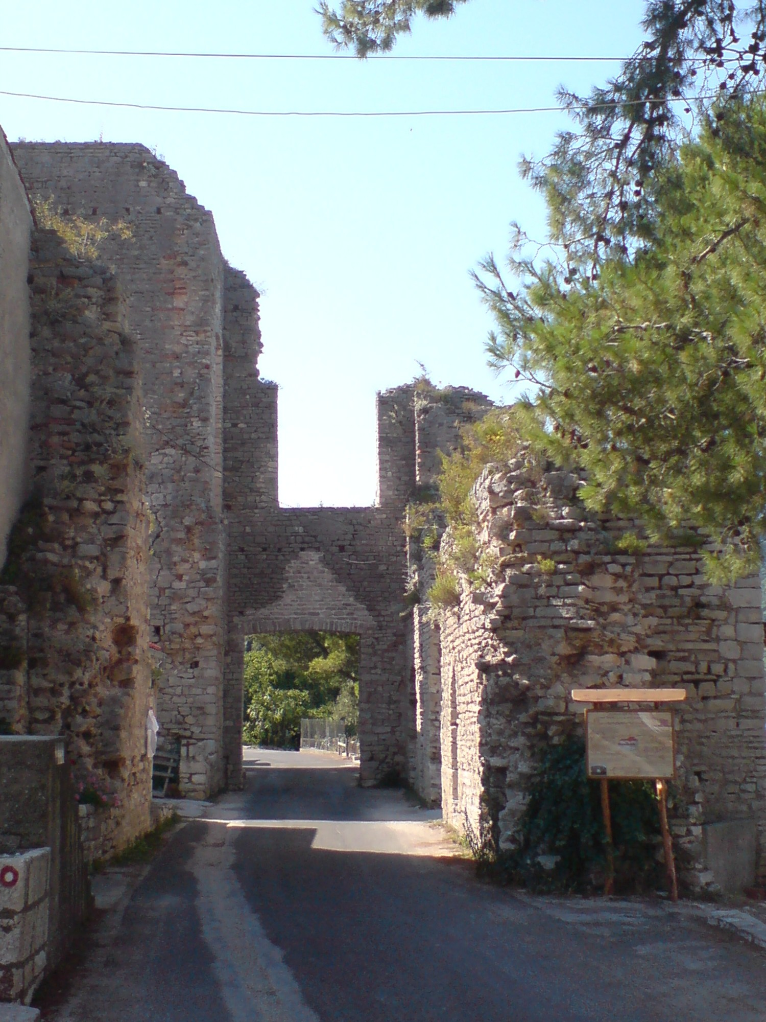 Polače ruins, Mljet, Croatia